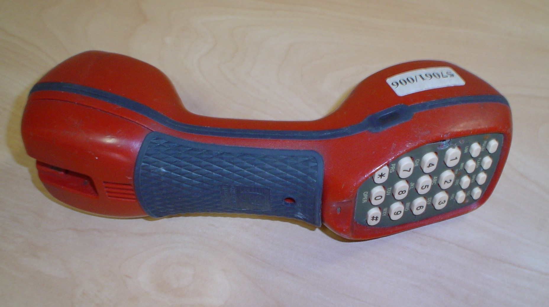 Riparista integra butonara telefono